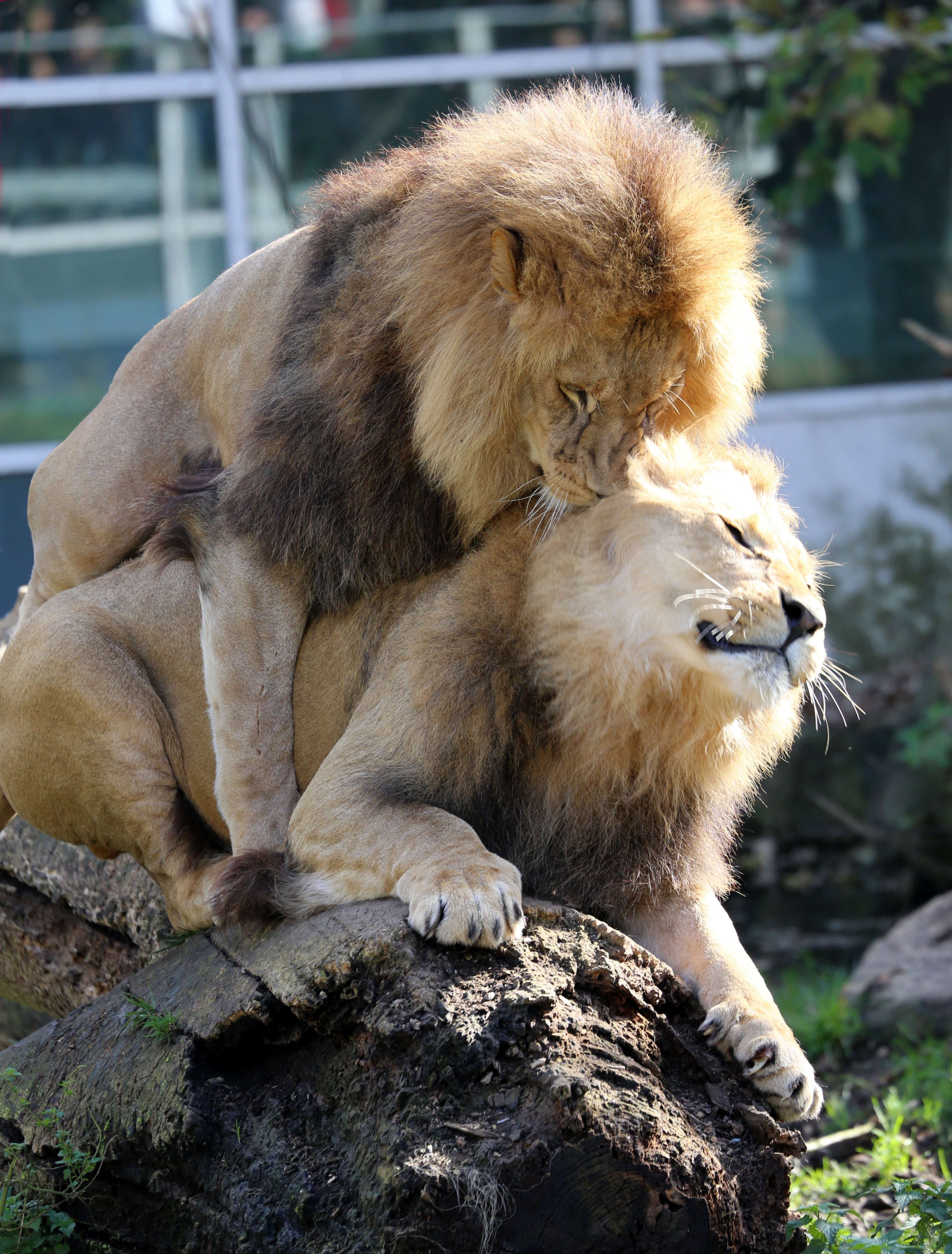 Zwei junge männliche Löwen (Panthera leo), Tierpark Hellabrunn, München